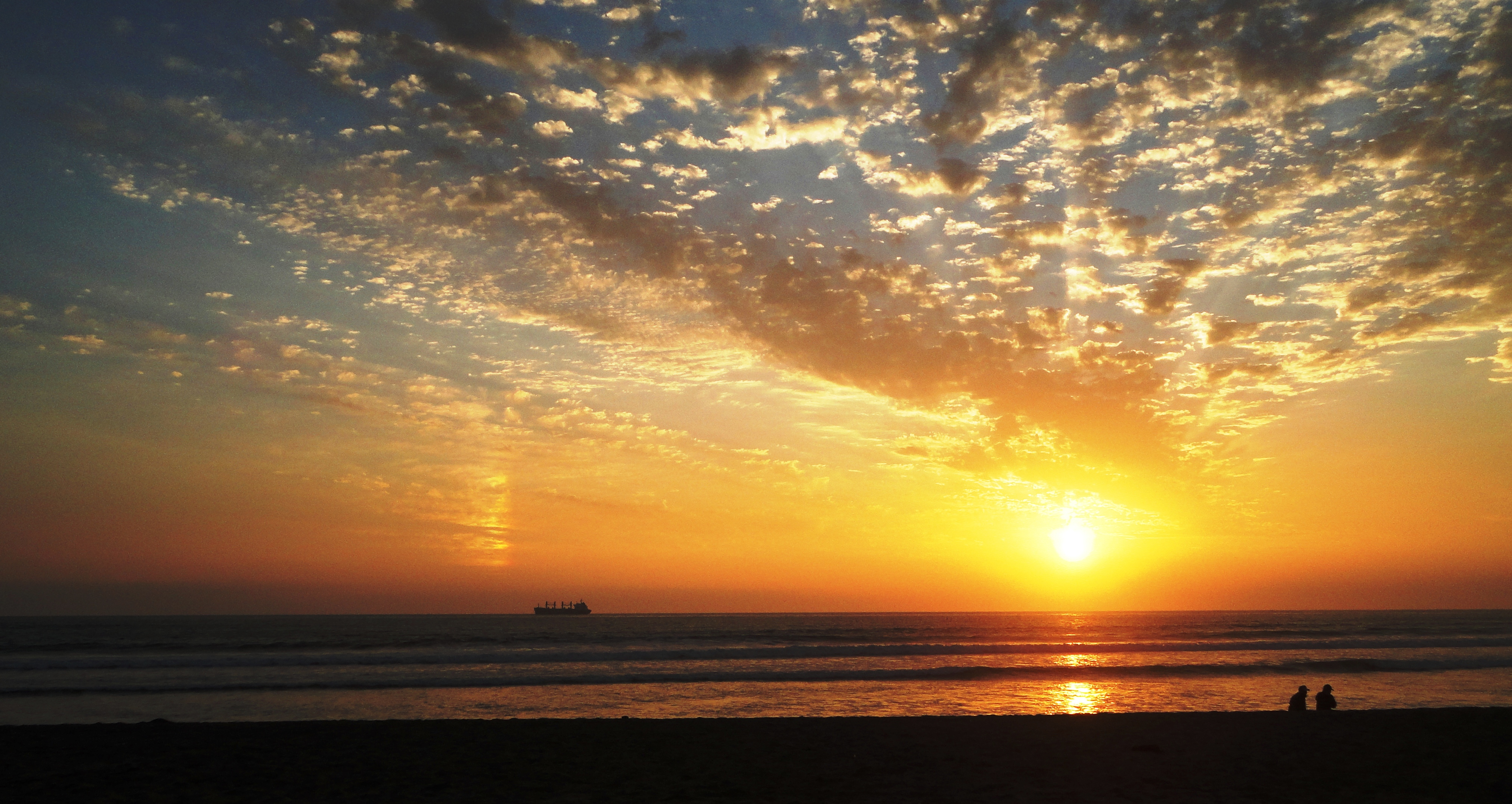 playa chinchorro